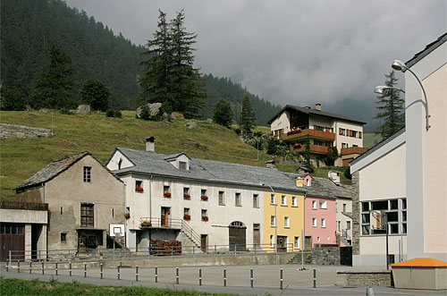 Simplon-Dorf: Schulhausplatz